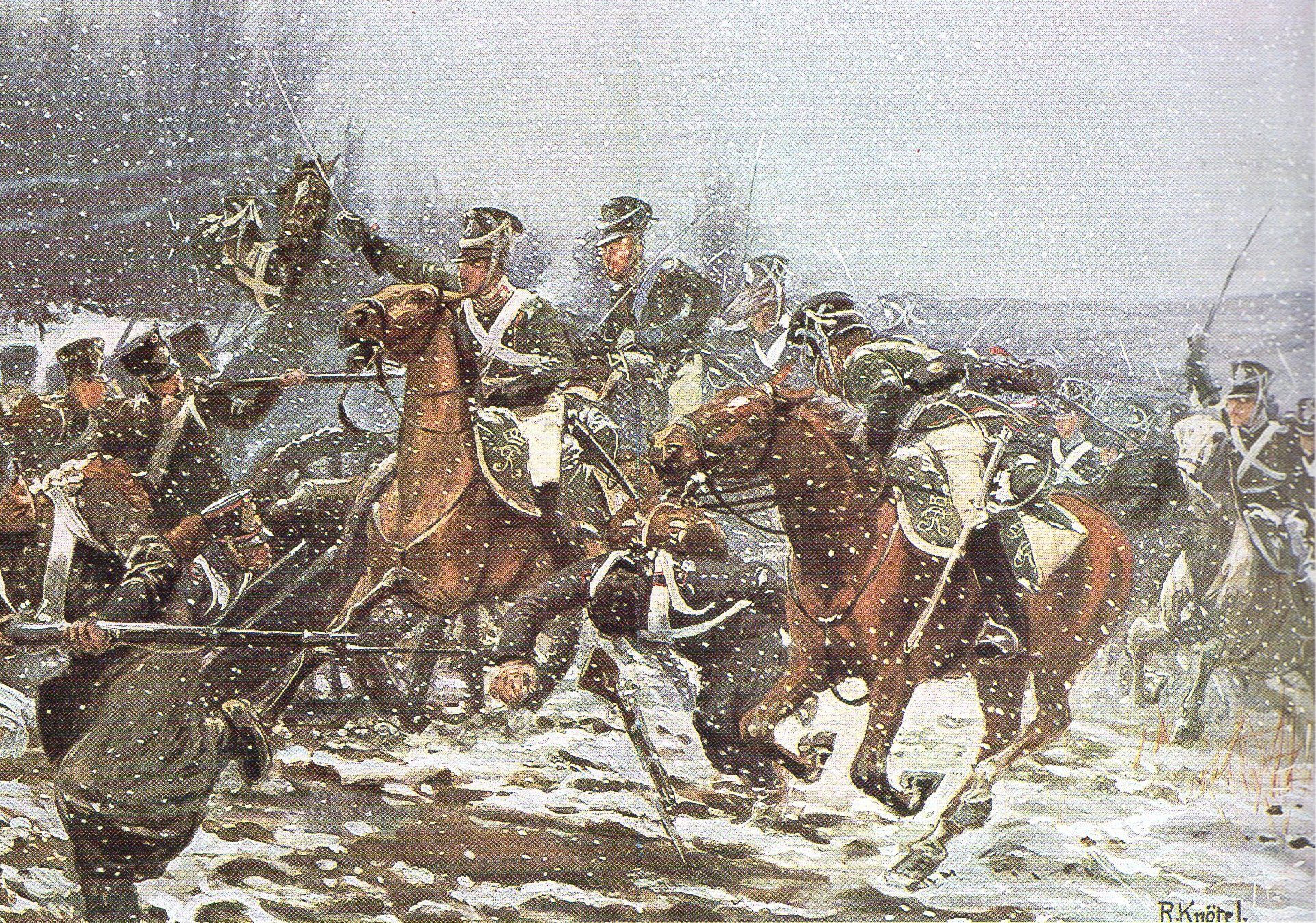 Charge des cavaliers wurtembourgeois à La Rothière, le 1er février 1814.